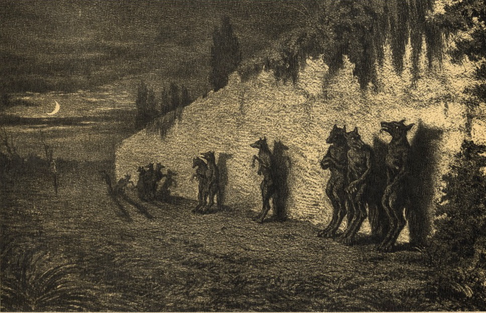 Des loups-garous adossés nuitamment au mur d'un cimetière. Lithographie de Maurice Sand, extraite des Légendes rustiques de George Sand, Paris, Bibliothèque des Arts décoratifs, 1858.